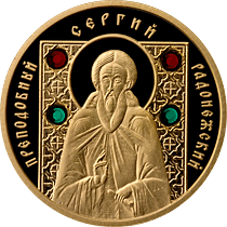 Памятна монета банку Білорусі "Сергій Радонезький". Реверс